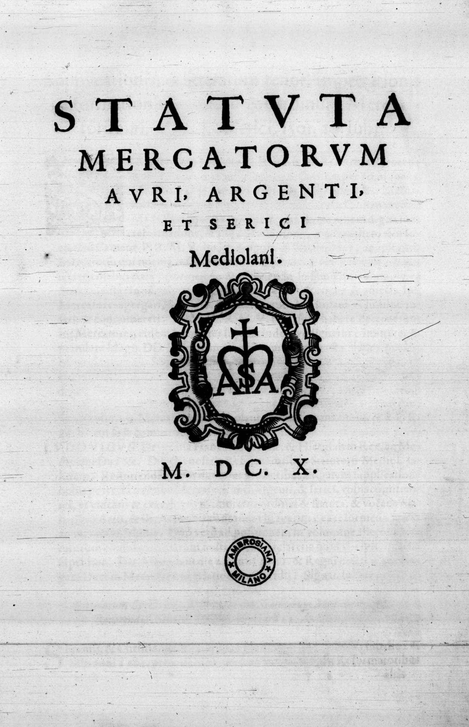 Frontespizio